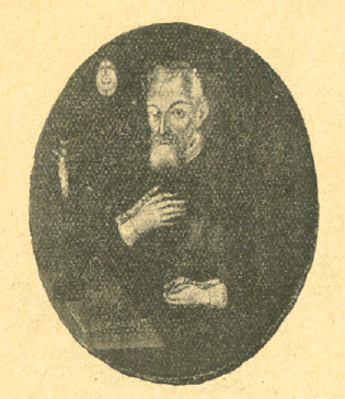 Baltazar Tyszka